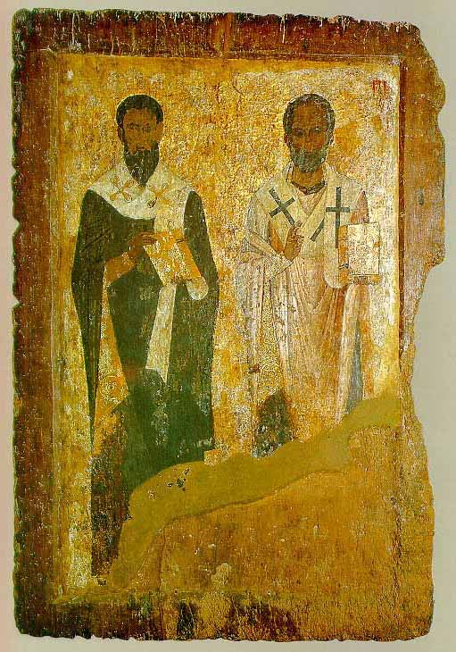 Иконата Св. Василиј Велики и Св. Никола Мирски потекнува од средината на 11 век. Сликана е со темпeра на штица, со димензии од 110 x 75 cm. Може да се претпостави дека иконата и биле подарена на катедралната црква Св. Софија во Охрид. Не е познато кога била пренесена во црквата Богородица Перивлептос (Св. Климент) во Охрид. Денеска се наоѓа во Галеријата на икони, Охрид.